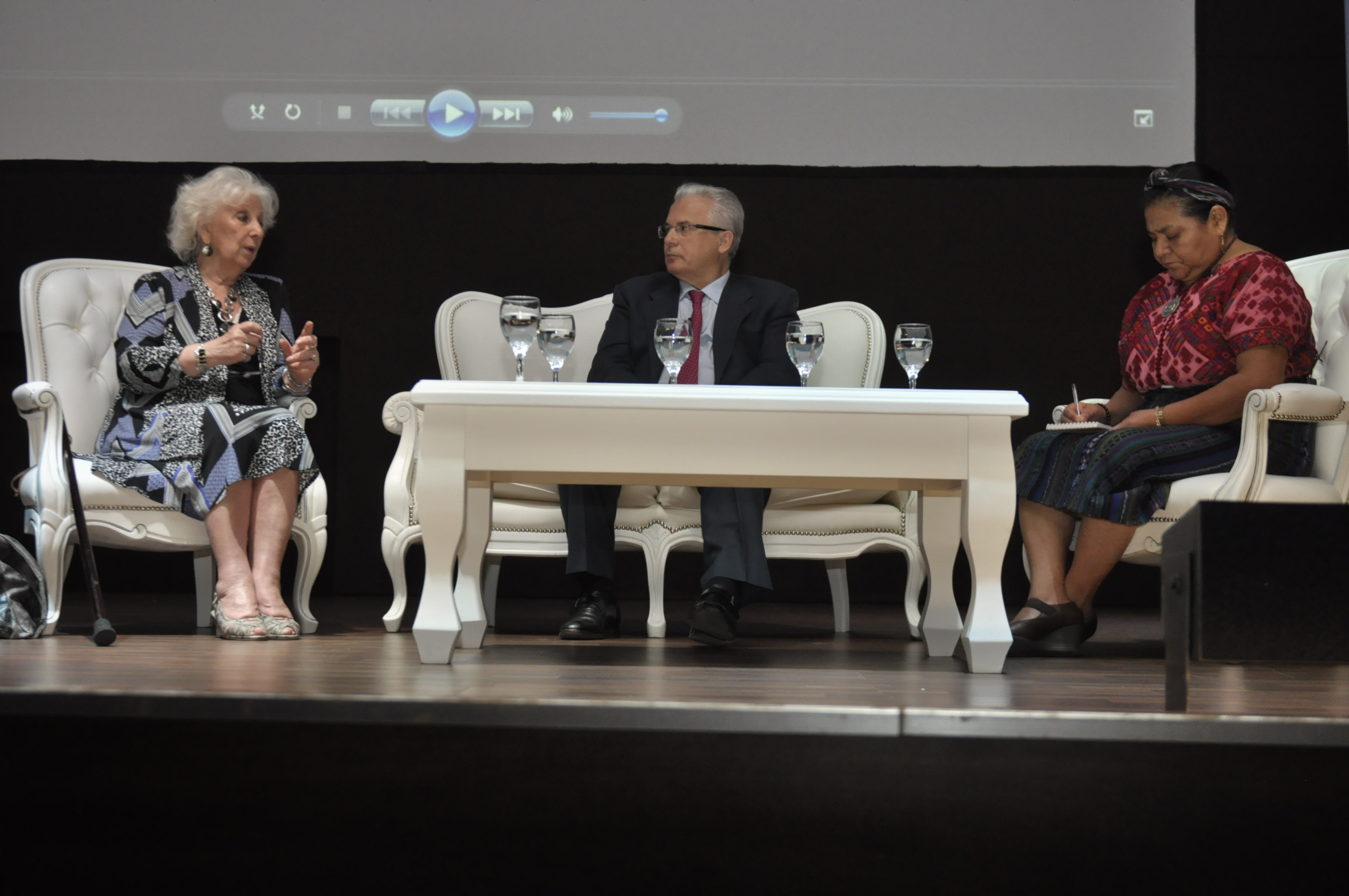 El ex juez Baltasar Garzón; la presidenta de Abuelas de Plaza de Mayo, Estela de Carlotto; y la premio Nóbel de la Paz Rigoberta Menchú, participaron de la conferencia "Diálogo sobre la perspectiva y defensa de los Derechos Humanos en América Latina" que se realizó en la UMET. Mi sitio